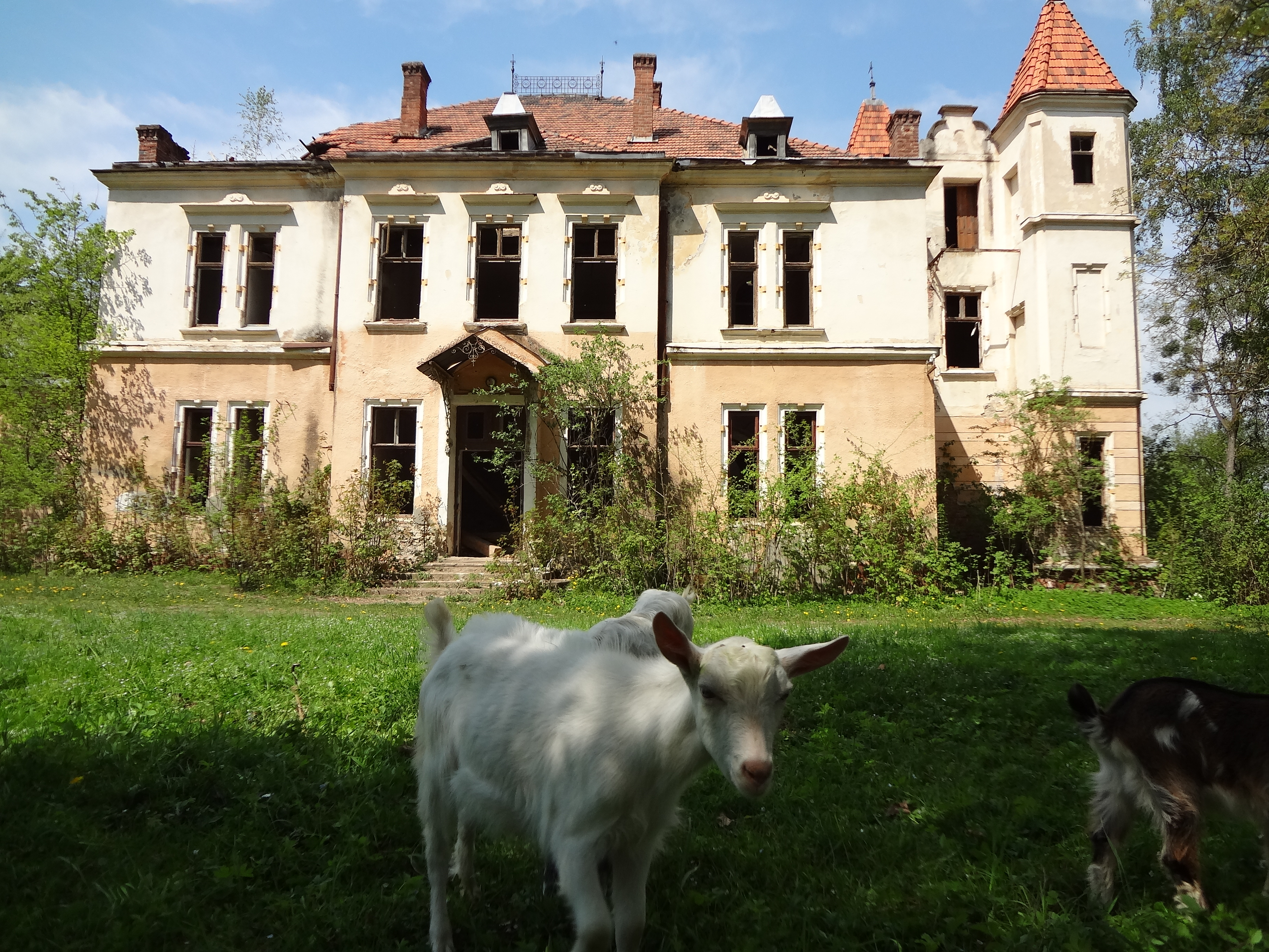 Палац Браніцьких, с.Підгірці